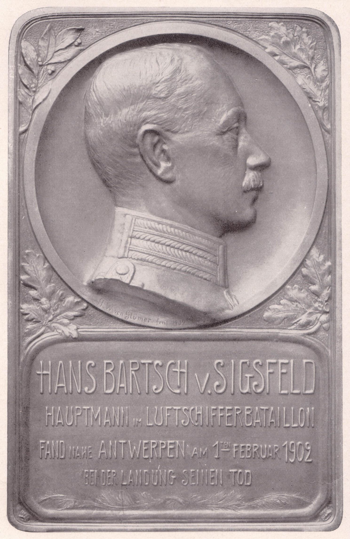 Reliefbild am Denkmal des Hauptmanns im Luftschiffer-Bataillon, Bartsch von Sigsfeld, in der Berliner Jungfernheide. Bild entnommen aus dem Buch "Georg von Tschudi - aus 34 Jahren Luftfahrt", erschienen 1928 bei Raimar Hobbing in Berlin. Bartsch von Sigsfeld starb 1902 (wie sich auf dem Bild selbst erkennen lässt), das Reliefbild bzw. das Foto stammt aus dem Jahre 1903. Demnach müssten die Bildrechte abgelaufen sein.